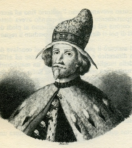 Потрет дожа Доменико II Контарини